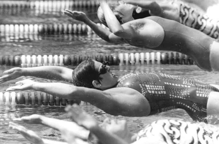 Birgit Treiber ADN-ZB Link 3.7.78-str- Berlin: DDR-Meisterschaften im Schwimmen- Kraftvoll startet Birgit Treider (SC Einheit Dresden). Über 100 m Rücken gewann sie den Titel in 1:03,23 min (Foto vom Vorlauf).